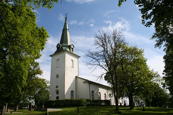 Örby kyrka i Västra Götaland